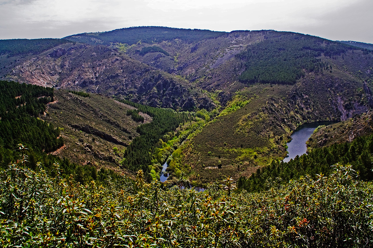 Río Sorbe en la cola del azud del Pozo de los Ramos